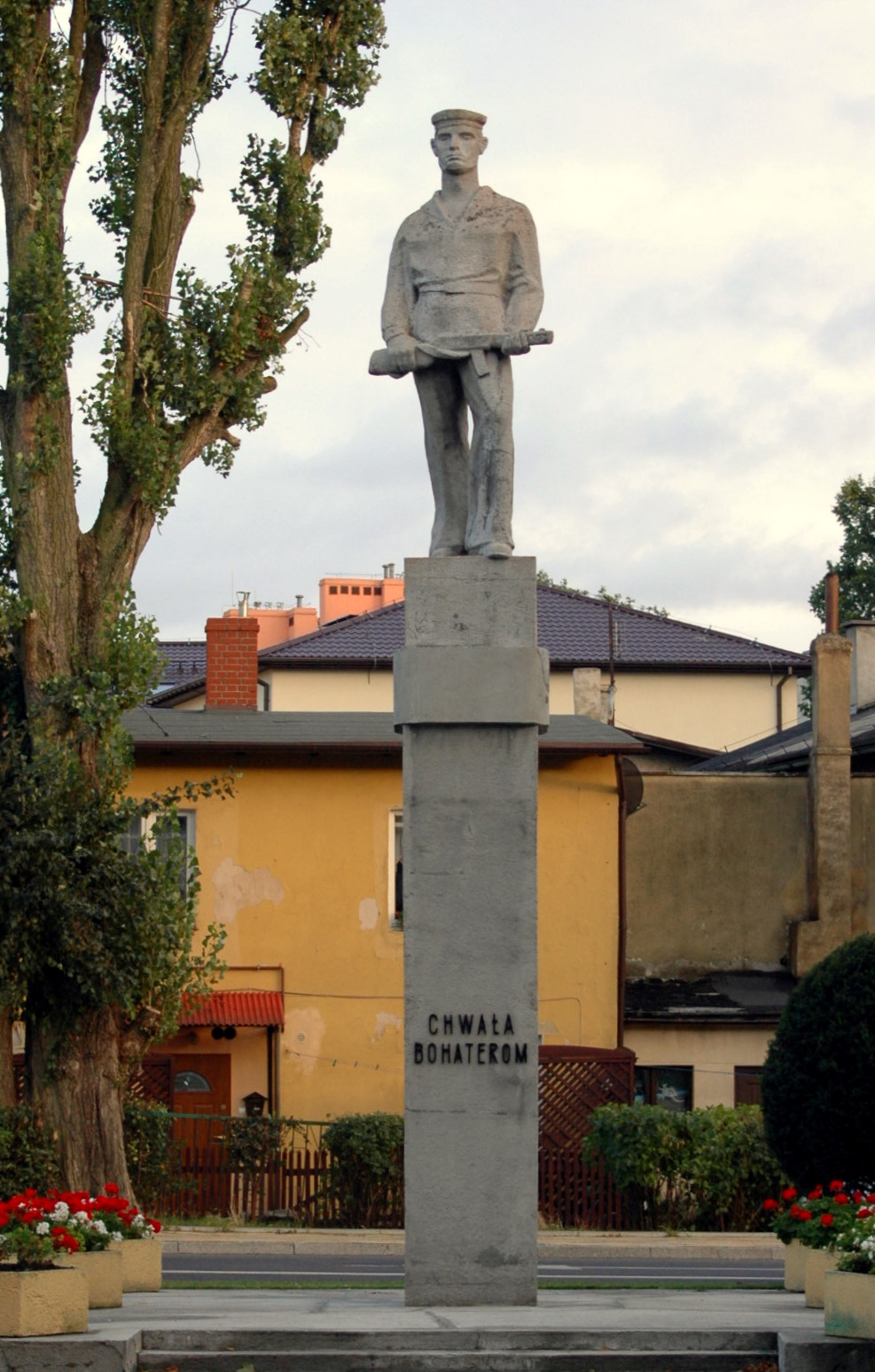 Pomnik poświęcony bohaterom wojennym